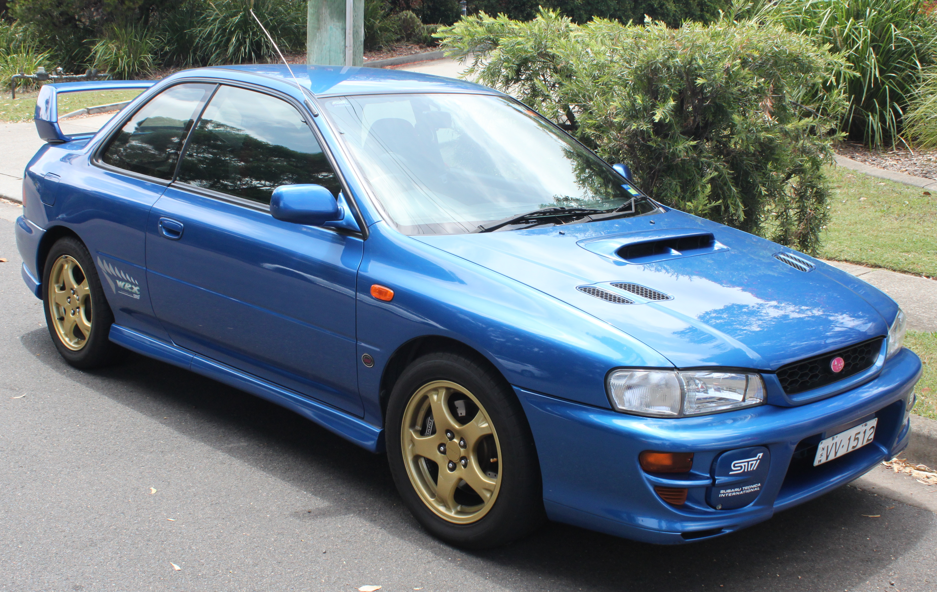 Subaru Impreza N WRX STi Version 5 Coupe